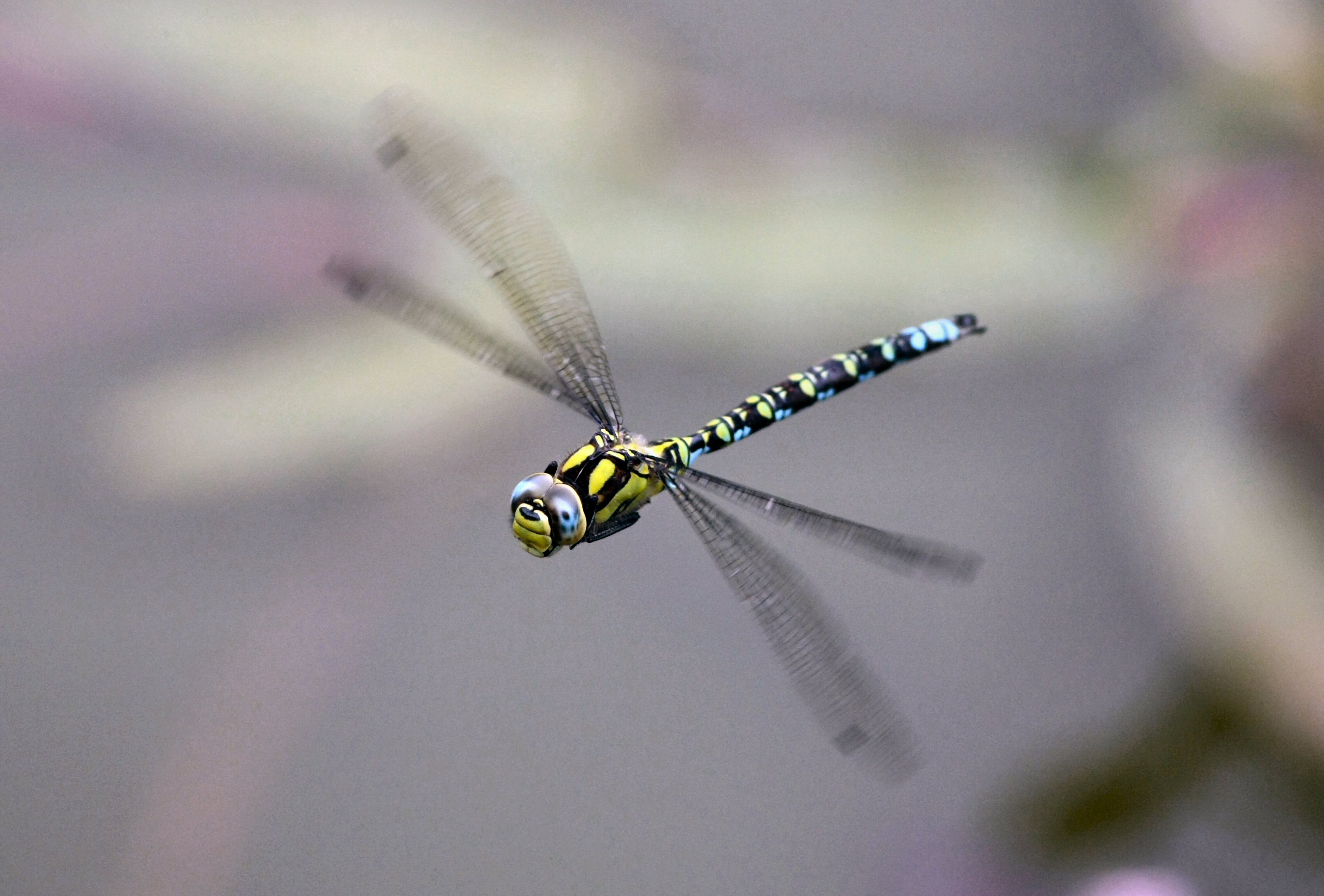 Blaugrüne Mosaikjungfer (Aeshna cyanea) - Großes Männchen im Flug